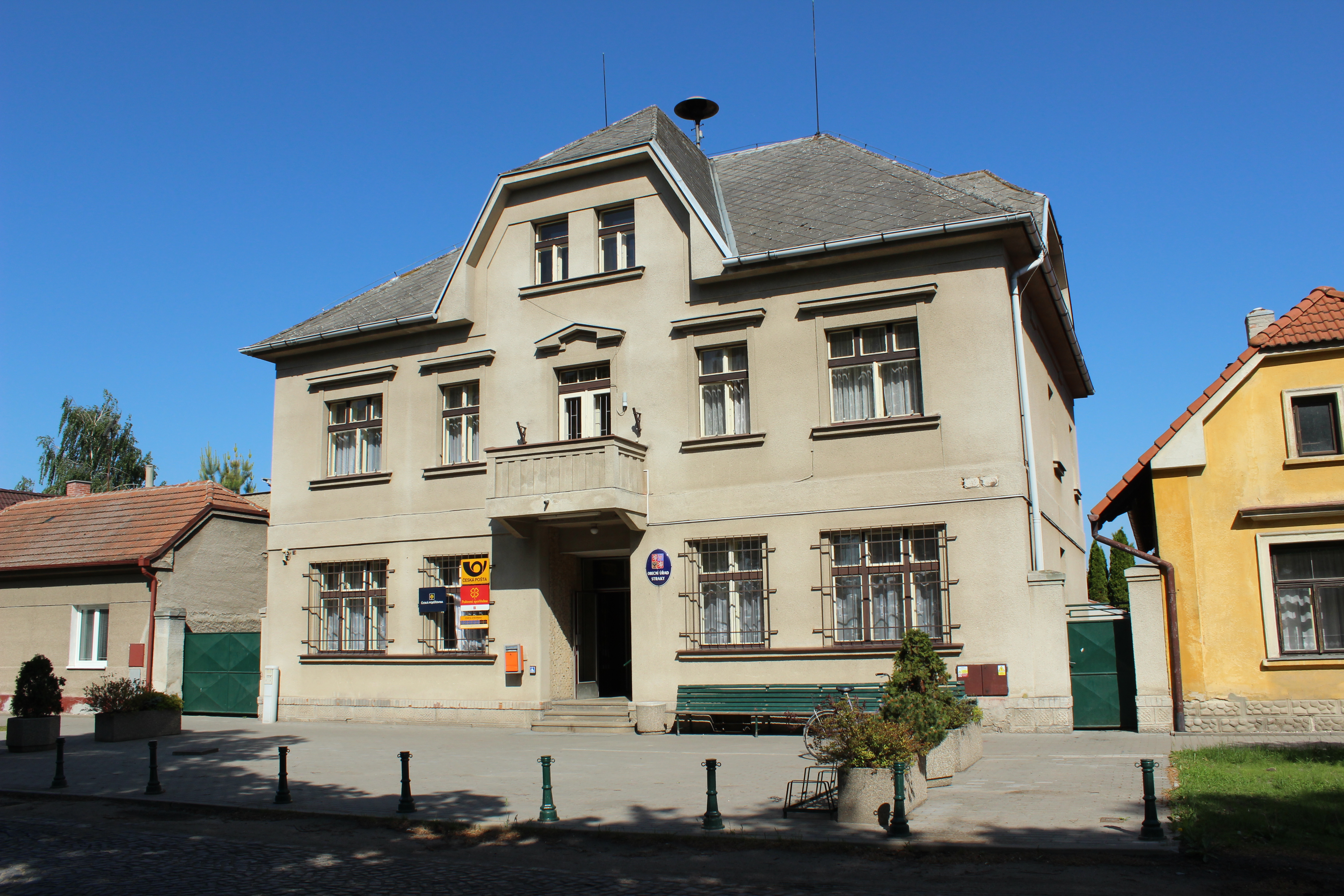 Straky; obecní úřad, v jehož prostorách se nachází i pobočka České pošty. Project: Fotíme Česko.